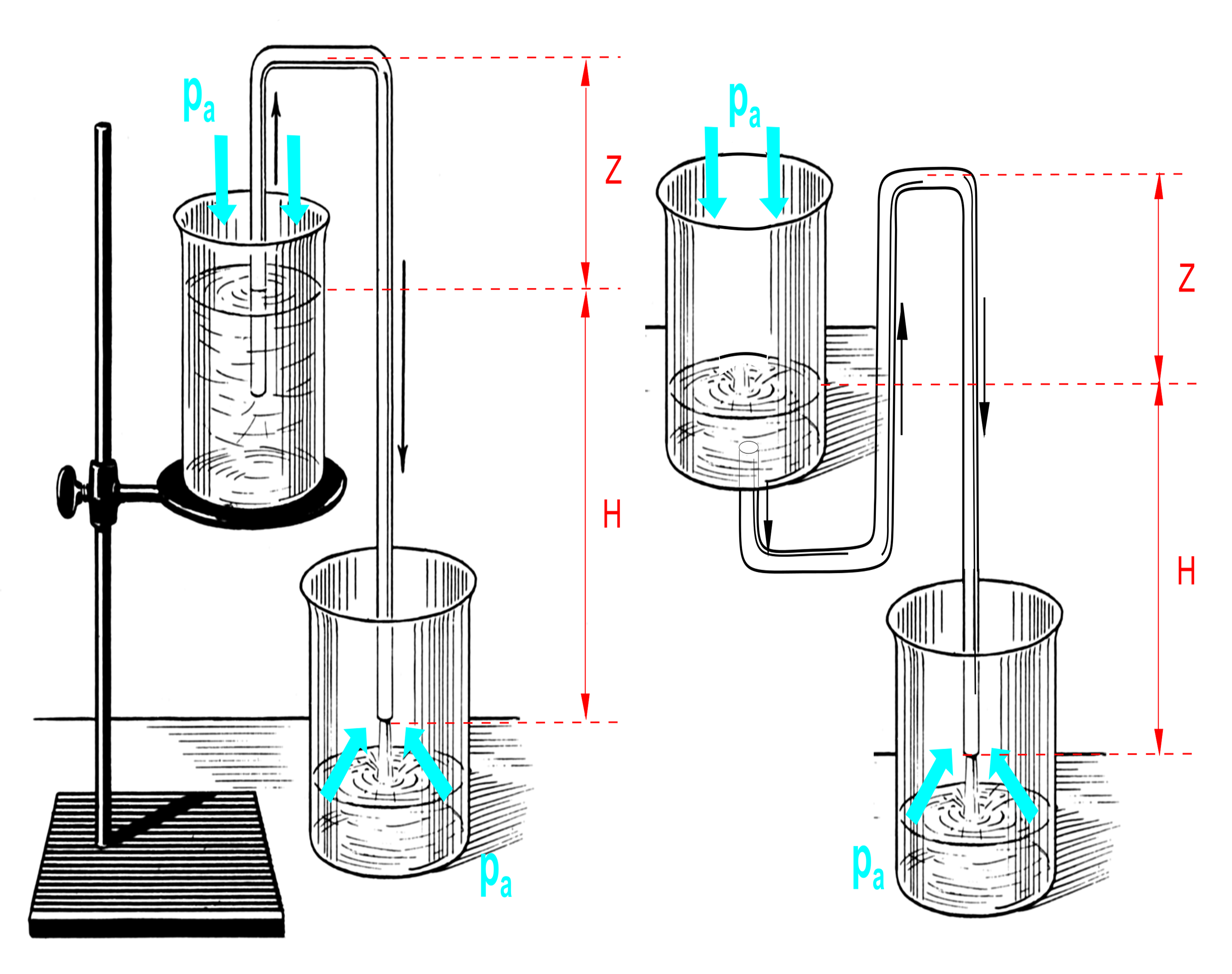 Lewar hydrauliczny (en. Siphon); schemat działania (podstawa: po lewej - rys. Scotta Foresmana, po prawej - modyfikacja według J. Ciborowskiego (Inżynieria chemiczna, PWT Warszawa, wyd.2, s.17)